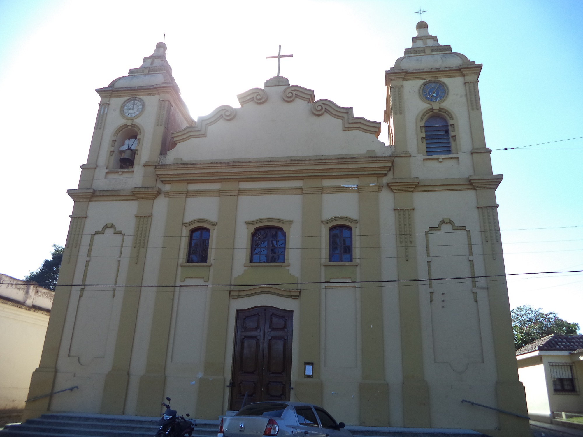 Igreja católica dedicada à padroeira do município: Santa Vitória. No interior encontra-se a imagem da santa, vinda da Itália.